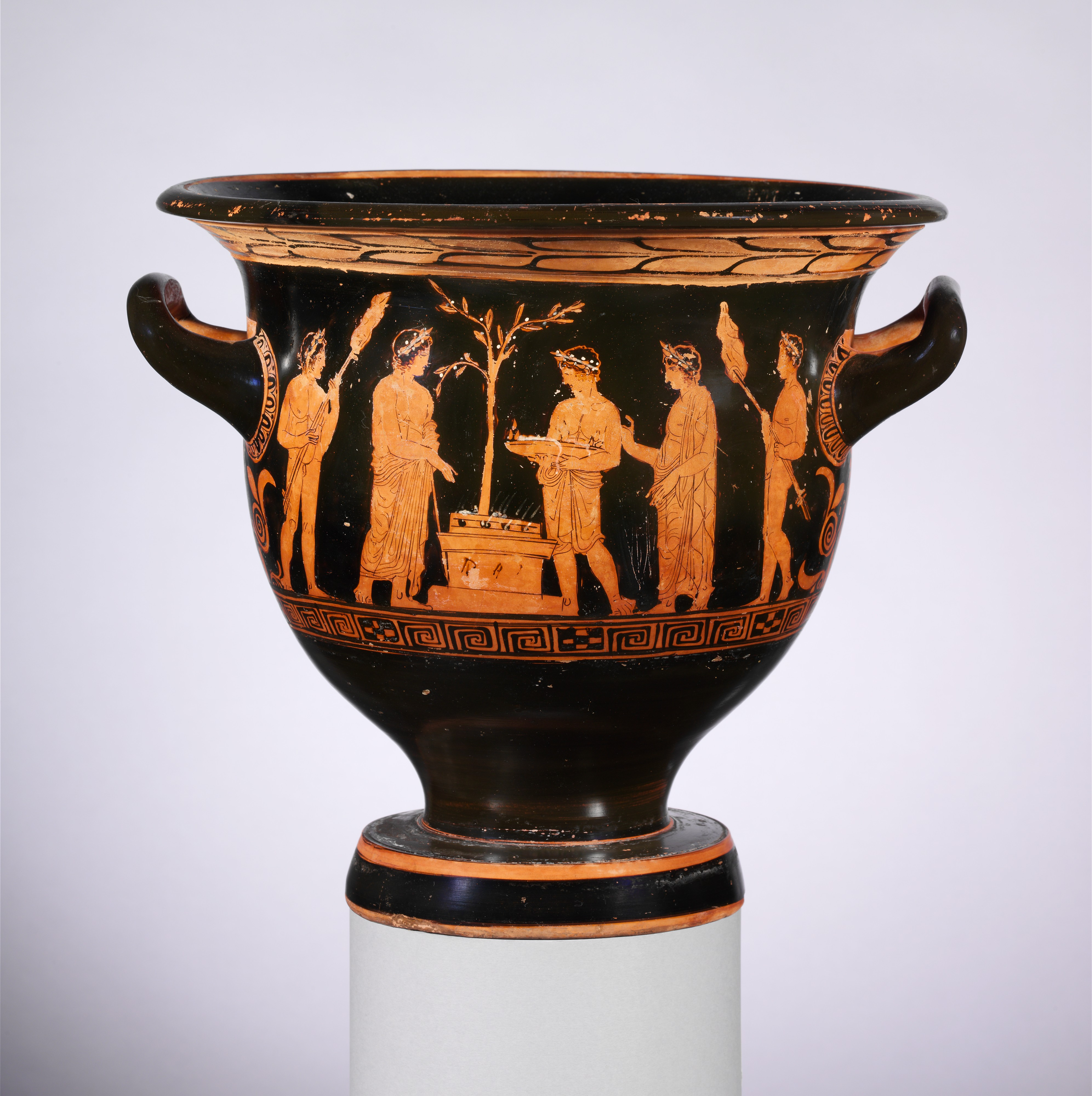 Greek, Attic; Bell-krater; Vases